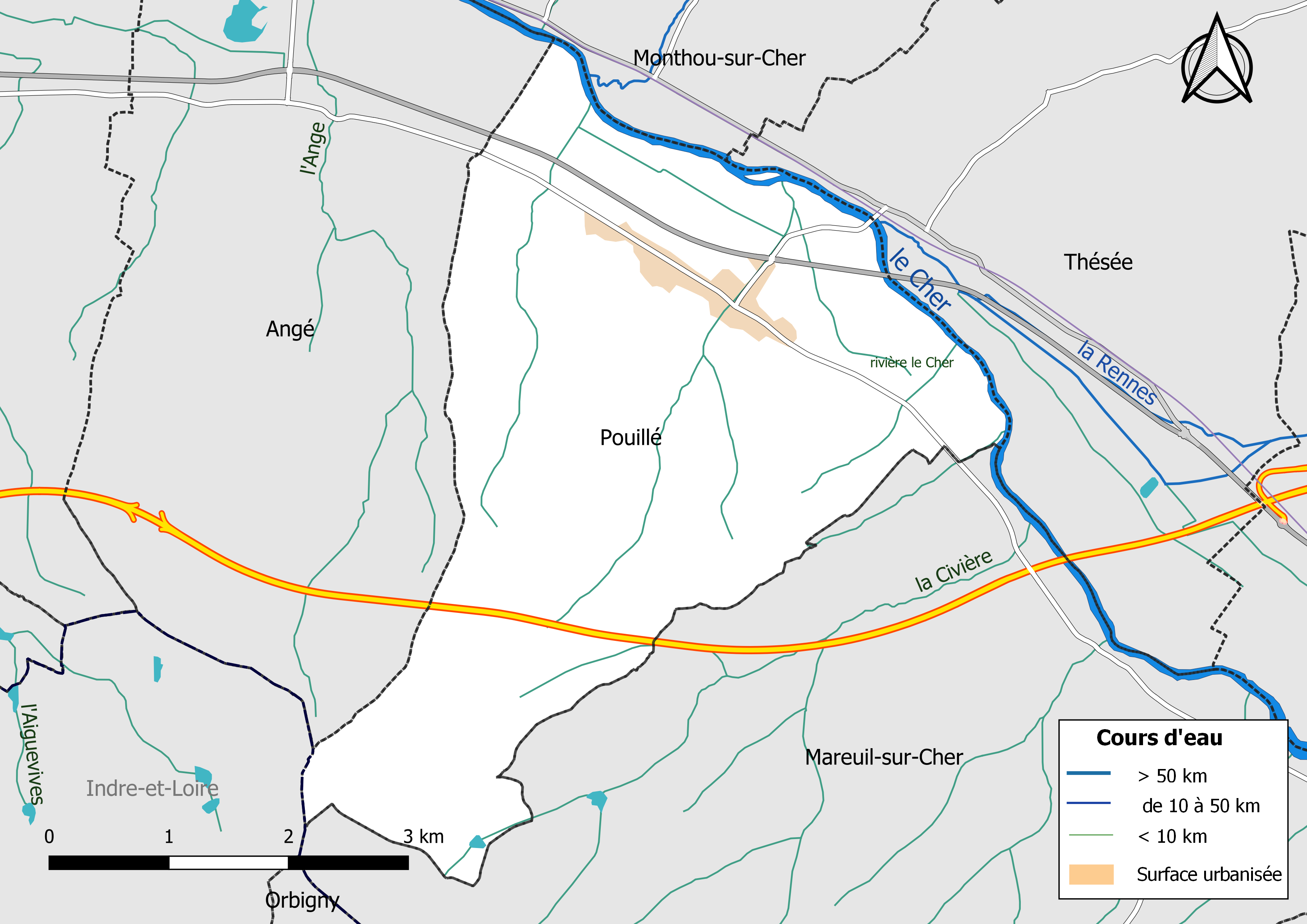 Carte du réseau hydrographique de la commune de Pouillé (Loir-et-Cher) (France).